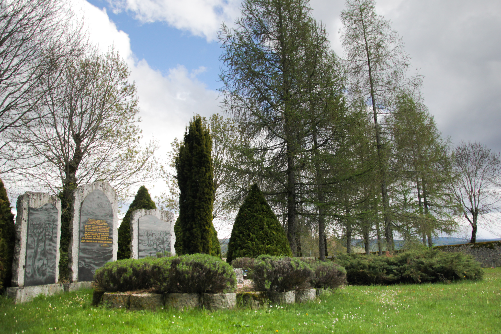 Ancien cimetière du centre hospitalier François-Toquelles de Saint-Alban-sur-Limagnole, Lozère (France). Couramment désigné sous le nom de "cimetière des fous"